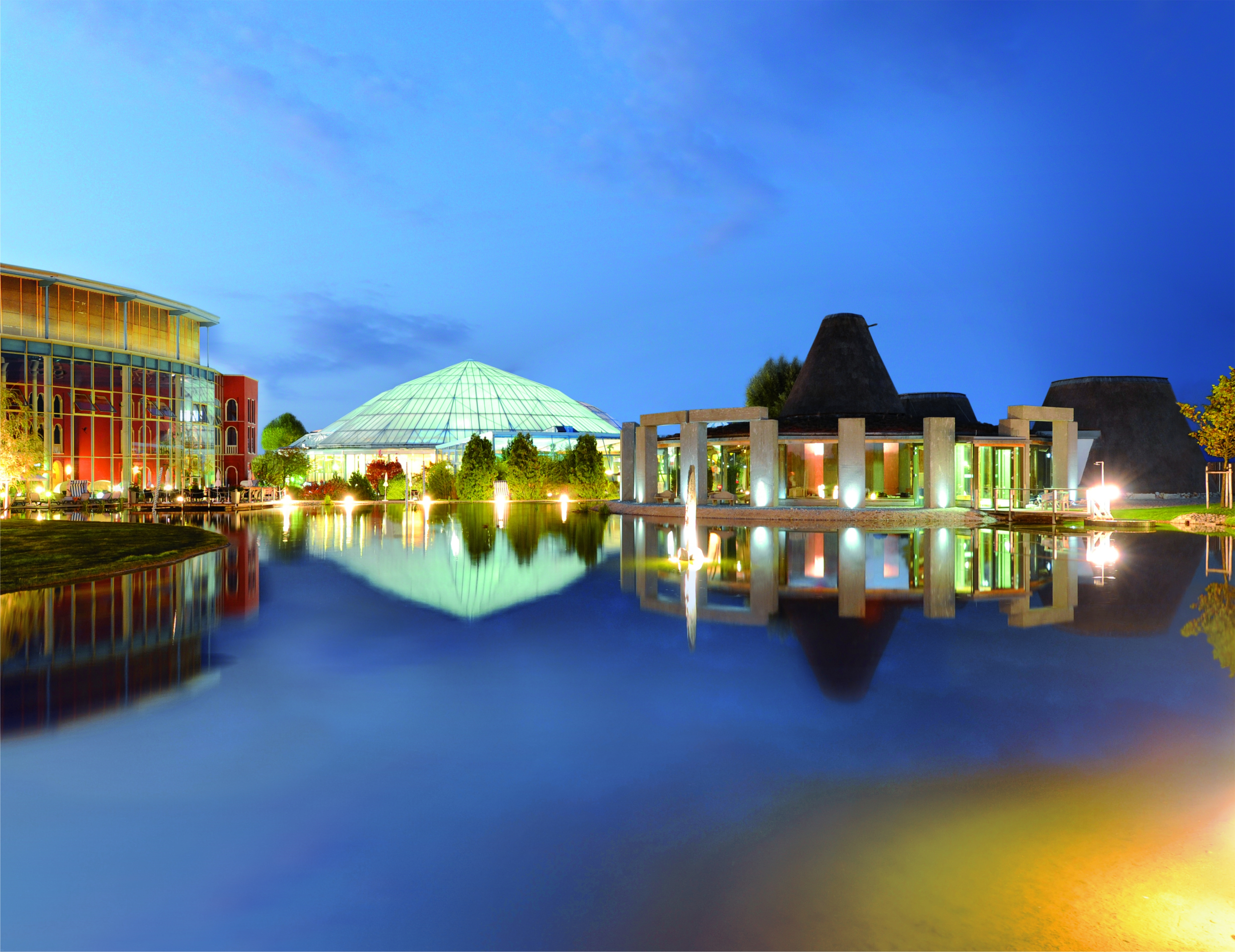 Außenansicht Sauna, Therme und Stonehenge